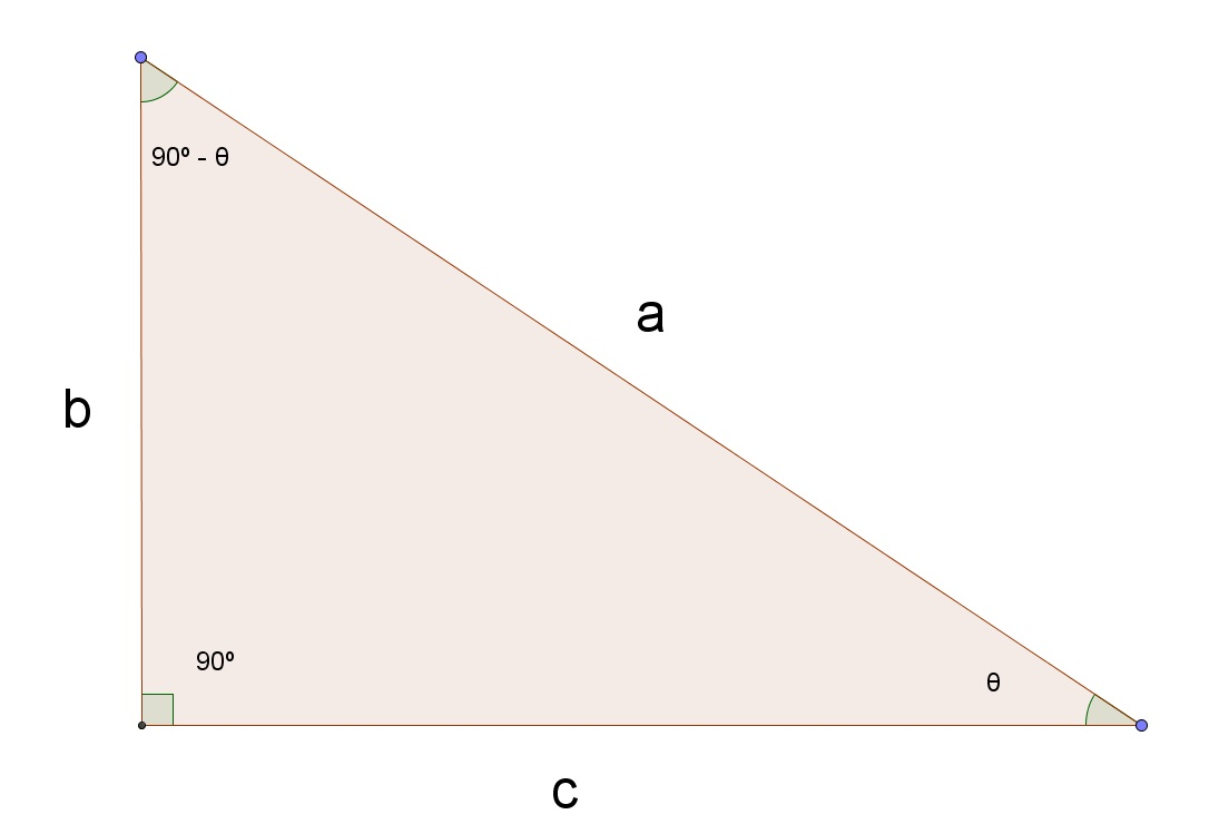 Imagem suporte para a demonstração da relação de simetria entre seno e cosseno de ângulos complementares